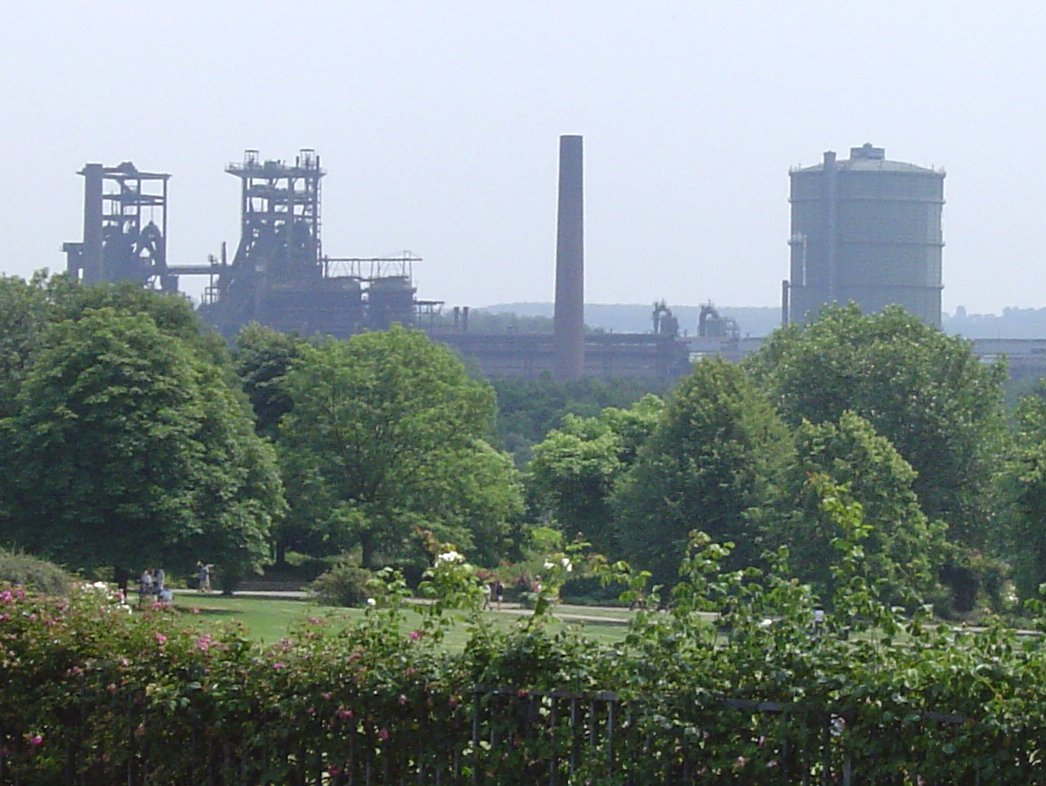 Westfalenpark Dortmund, im Hintergrund ehem. Stahlwerk Phoenix West